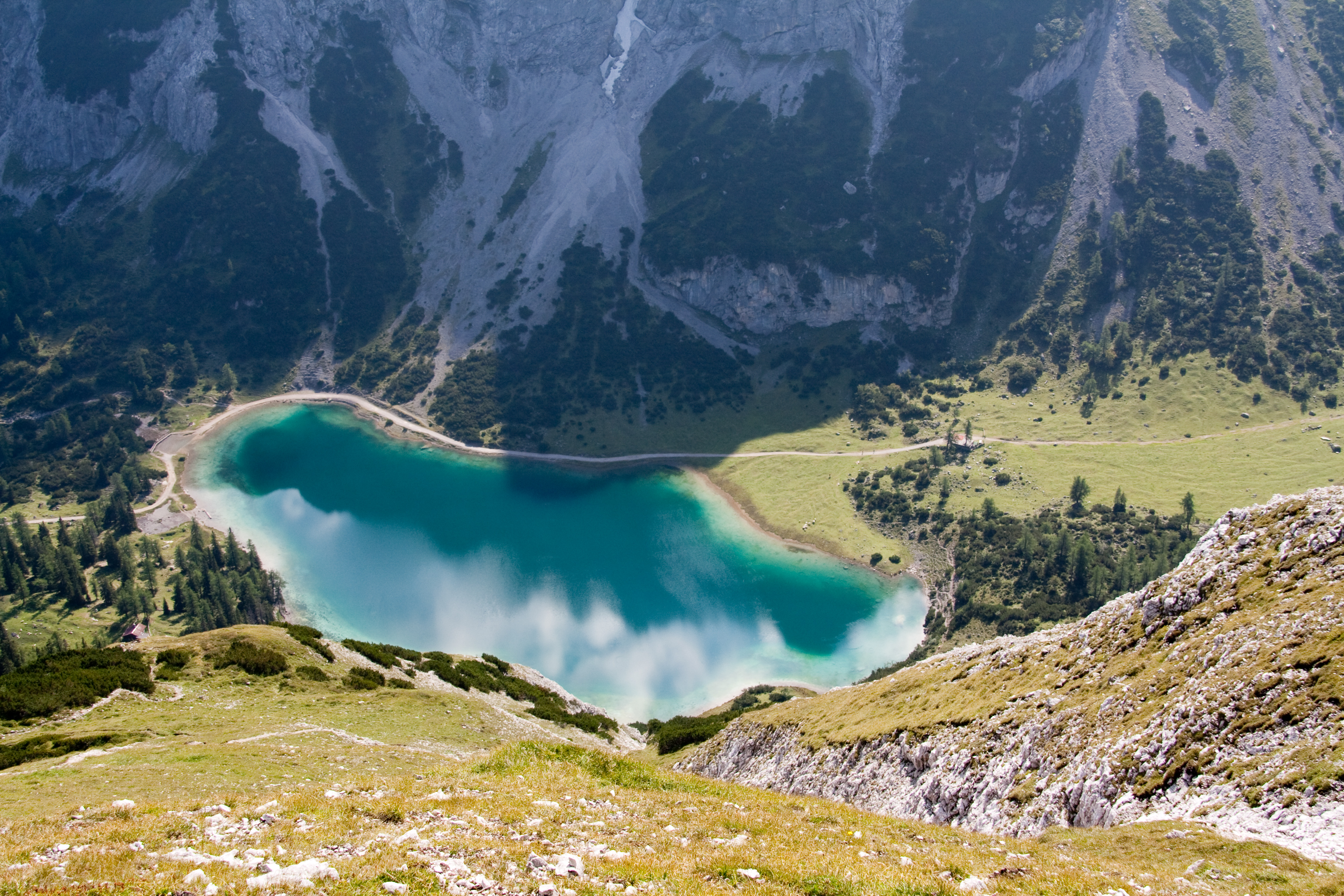 Der Seebensee vom Aufstieg zur Sonnenspitze